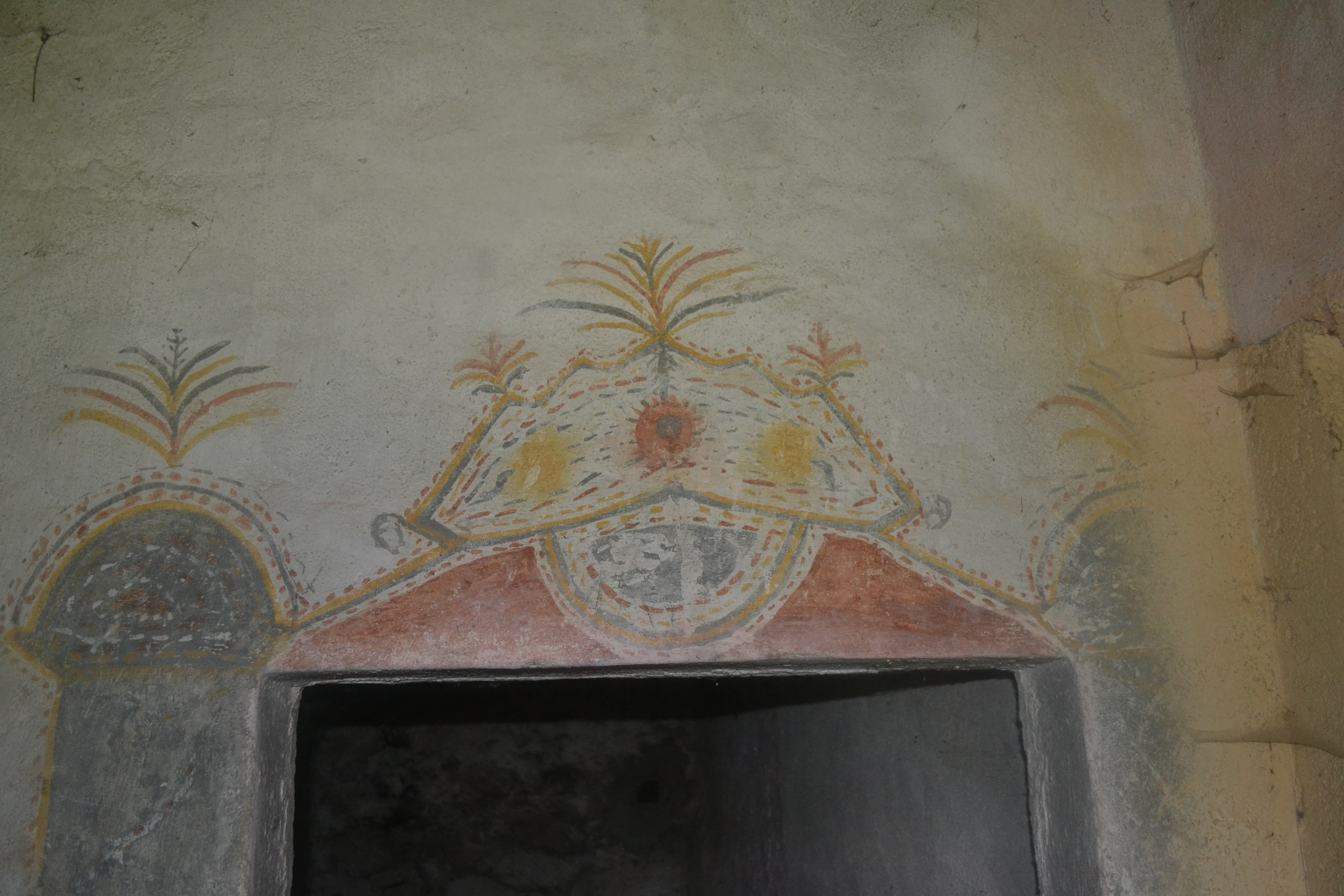 Santuario Santa Lucia Villanova Mondovì - Affreschi 1600